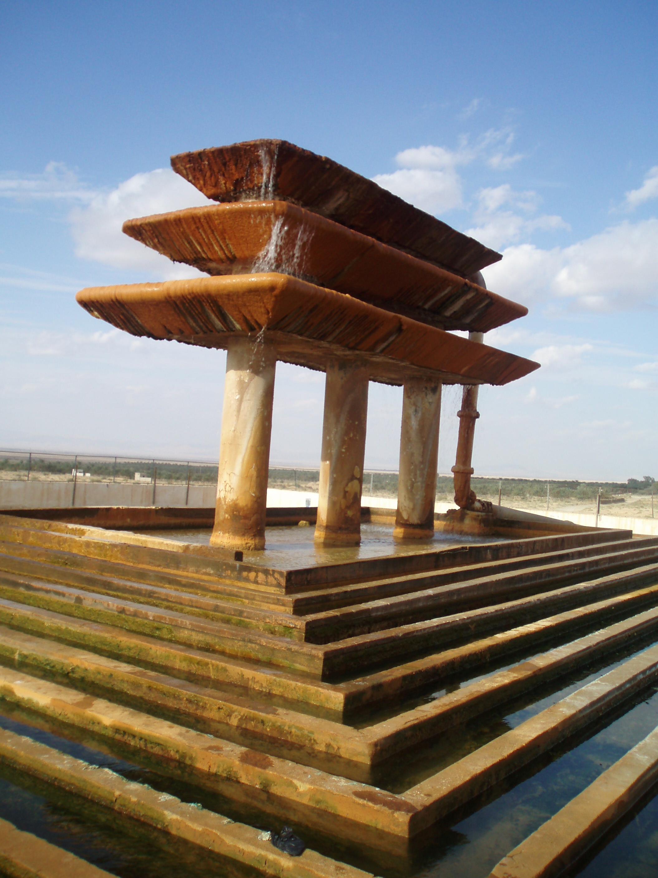 photographie personnelle d'une source d'eau chaude près de Tozeur.